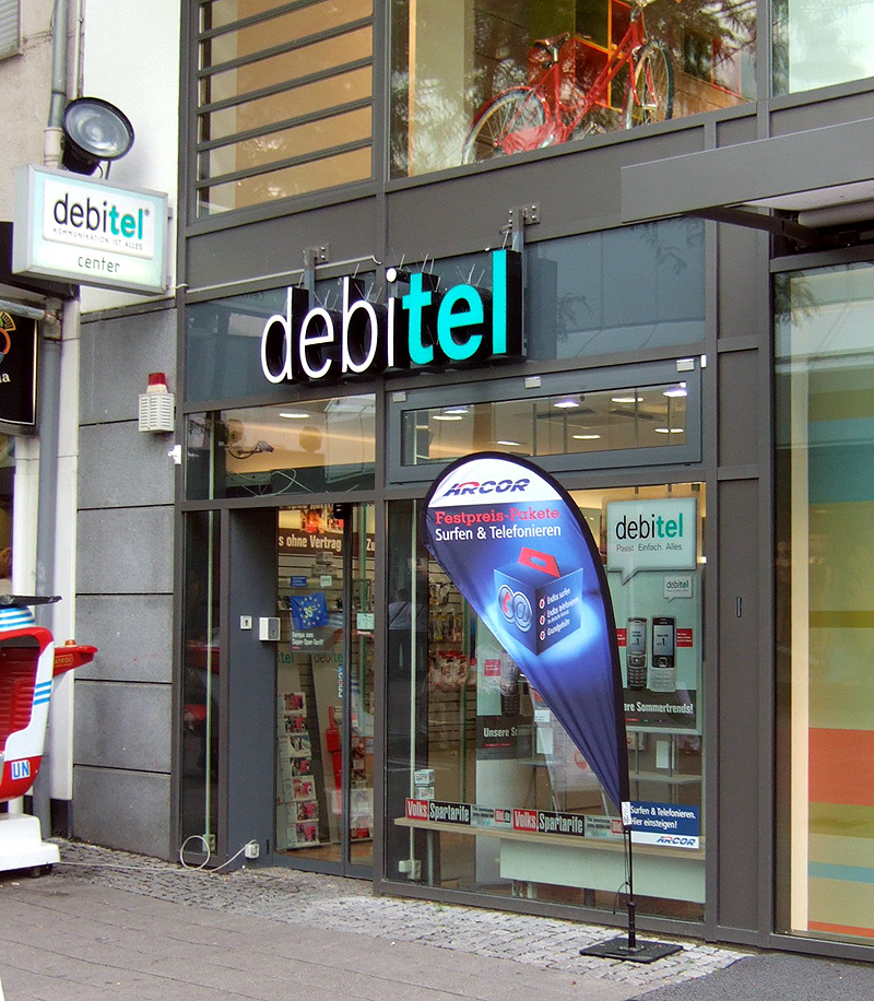 Debitel Geschäft in Darmstadt